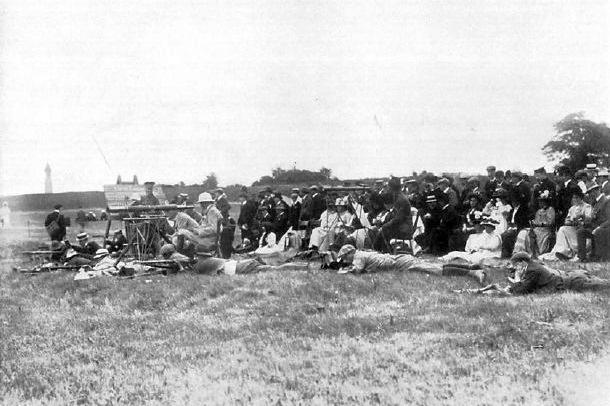 L'équipe britannique victorieuse, lors du 1000 yards rifle libre, couché (JO de Londres, 1908, Bisley Rifle Range, conté de Surrey).